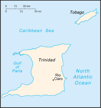 Rio Claro, Trinidad and Tobago